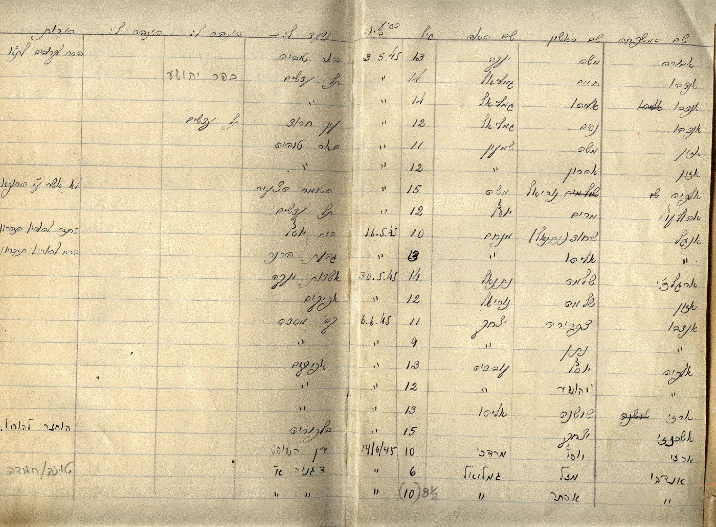 מחברת לוזיה - דף 1